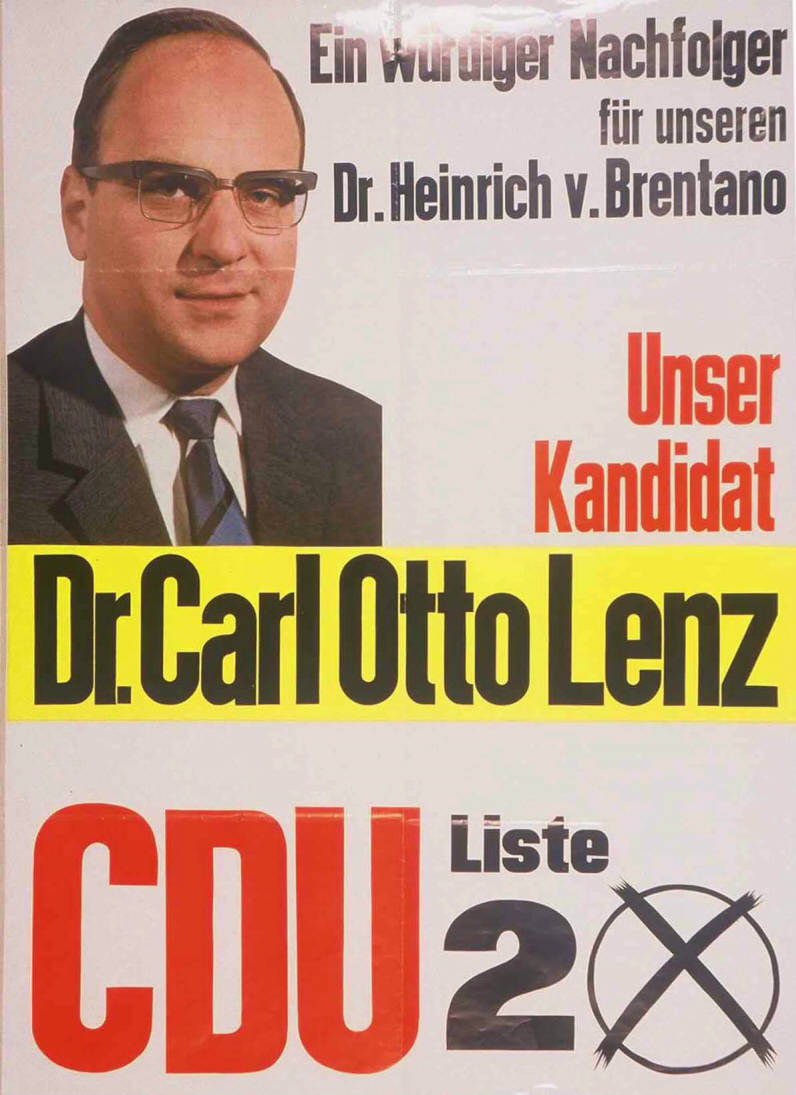 Ein würdiger Nachfolger für unseren Dr. Heinrich v. Brentano Unser Kandidat Dr. Carl Otto Lenz CDU Liste 2Abbildung:Porträtfoto - StimmkreuzKommentar:zweiteiliges PlakatPlakatart:Kandidaten-/Personenplakat mit PorträtObjekt-Signatur:10-001: 1127Bestand:Plakate zu Bundestagswahlen (10-001)GliederungBestand10-18:Plakate zu Bundestagswahlen (10-001) » Die 5. Bundestagswahl am 19. September 1965 » CDU » Mit PorträtfotoLizenz:KAS/ACDP 10-001: 1127 CC-BY-SA 3.0 DE